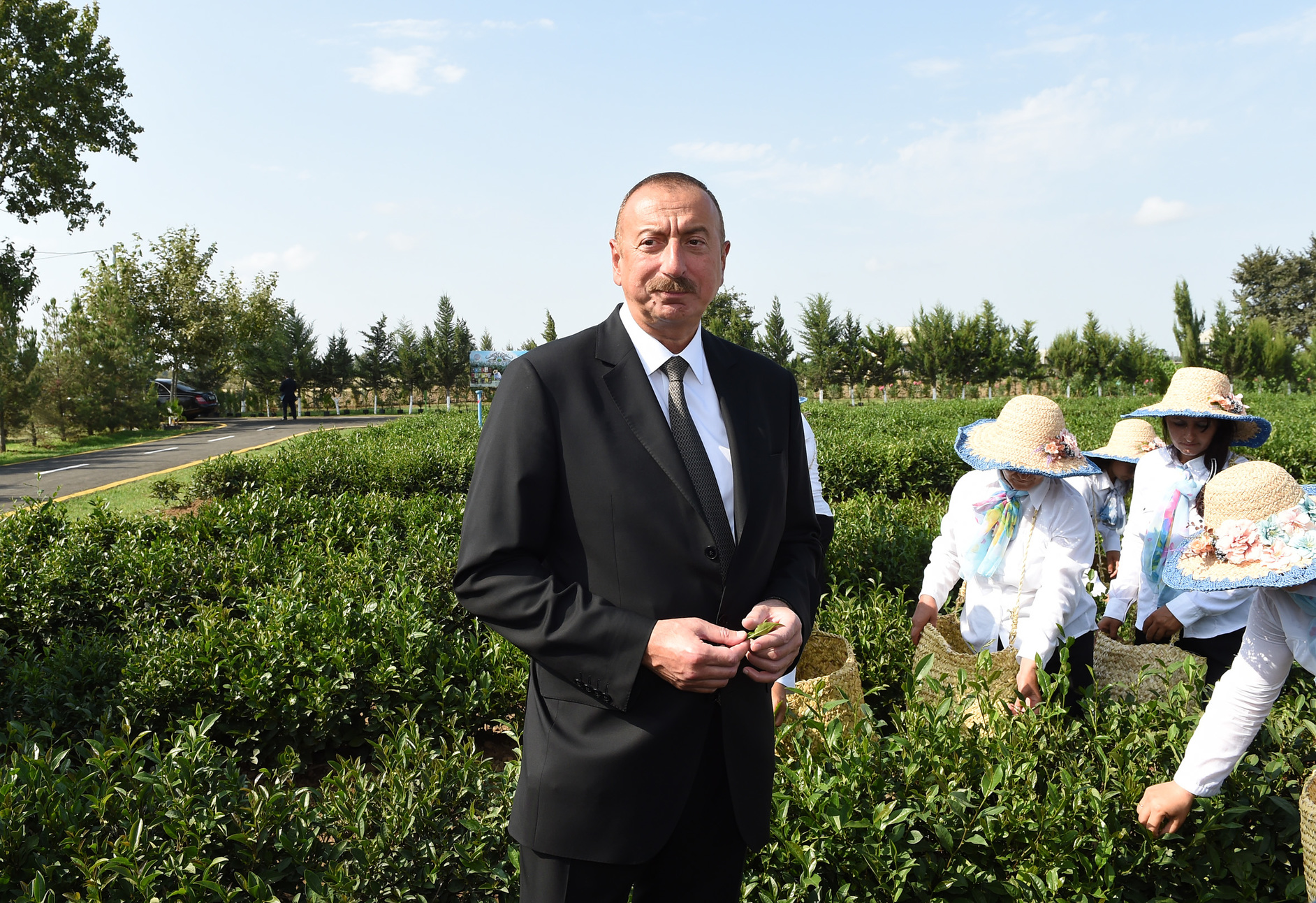 İlham Əliyev Lənkəranda “Yaşıl Çay” plantasiyası ilə tanış olarkən